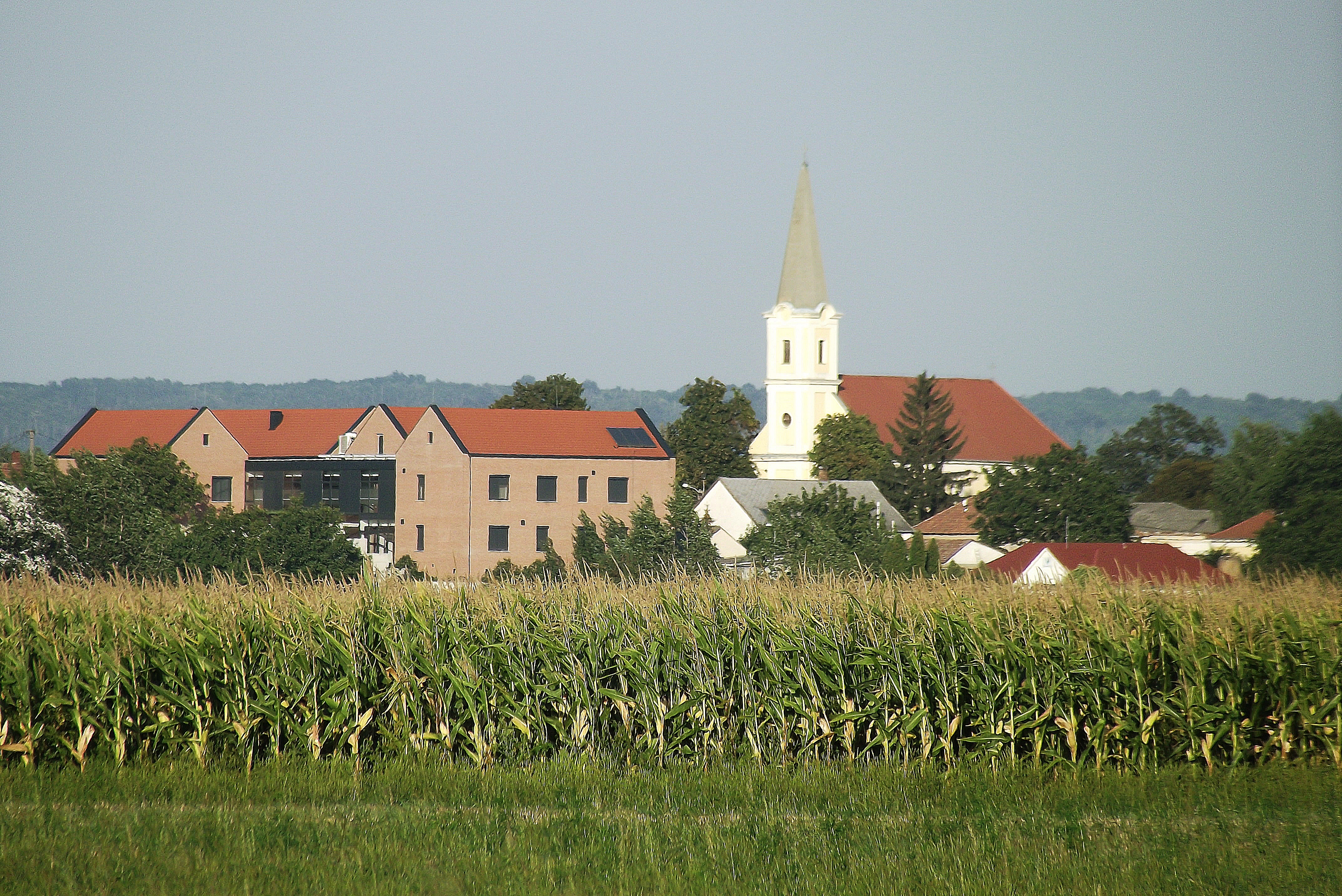 Tét város látképe dél-nyugati irányból 2015 szeptemberében.